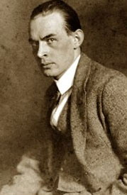 Еріх Марія Ремарк німецький письменник